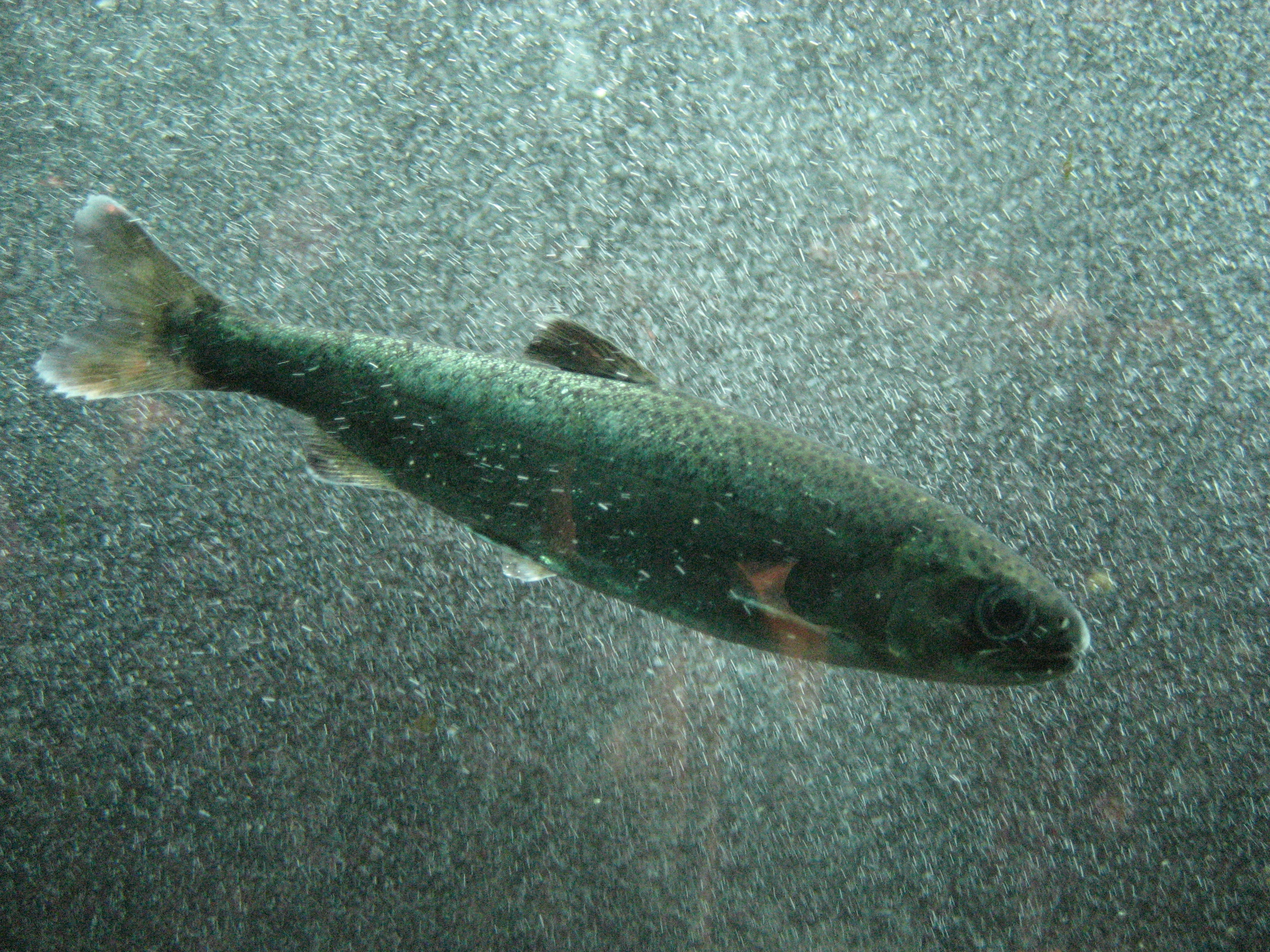 Petit saumon, Aquarium de Seatle, WA, USA Photo prise par Déclic